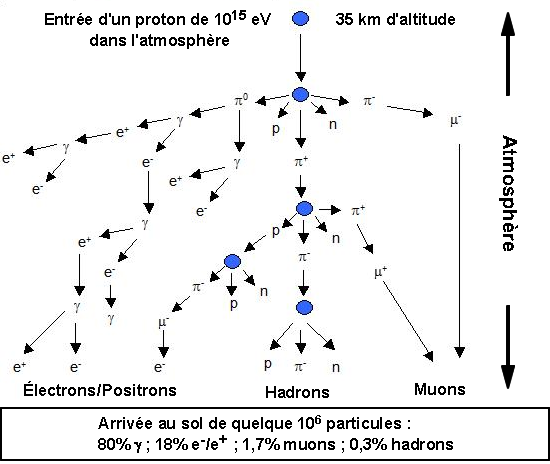 Gerbe de rayons cosmiques. (traduction de Image:Extended Air Shower.jpg).